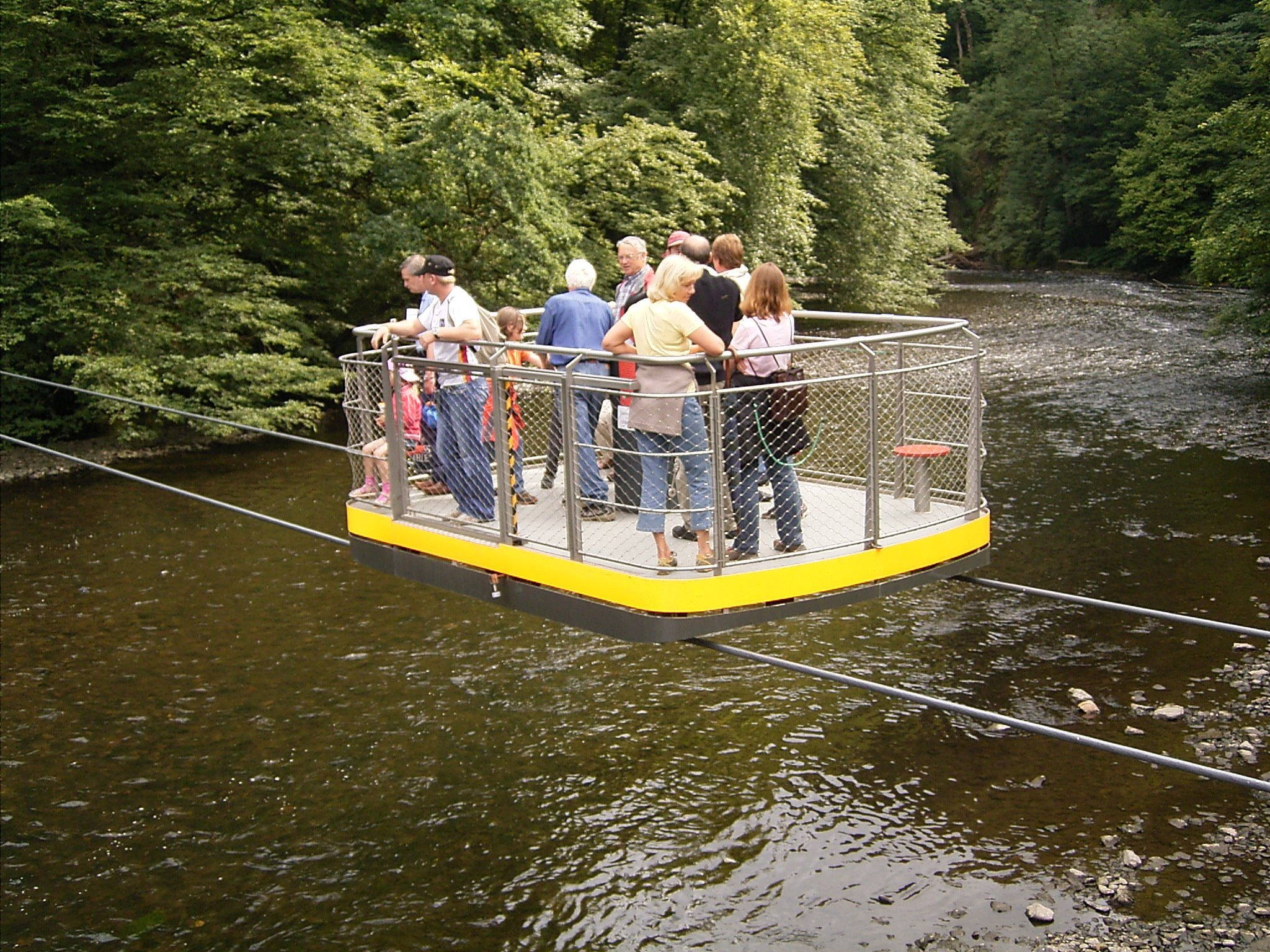 Schwebefähre Müngsten über die Wupper in Remscheid / Solingen